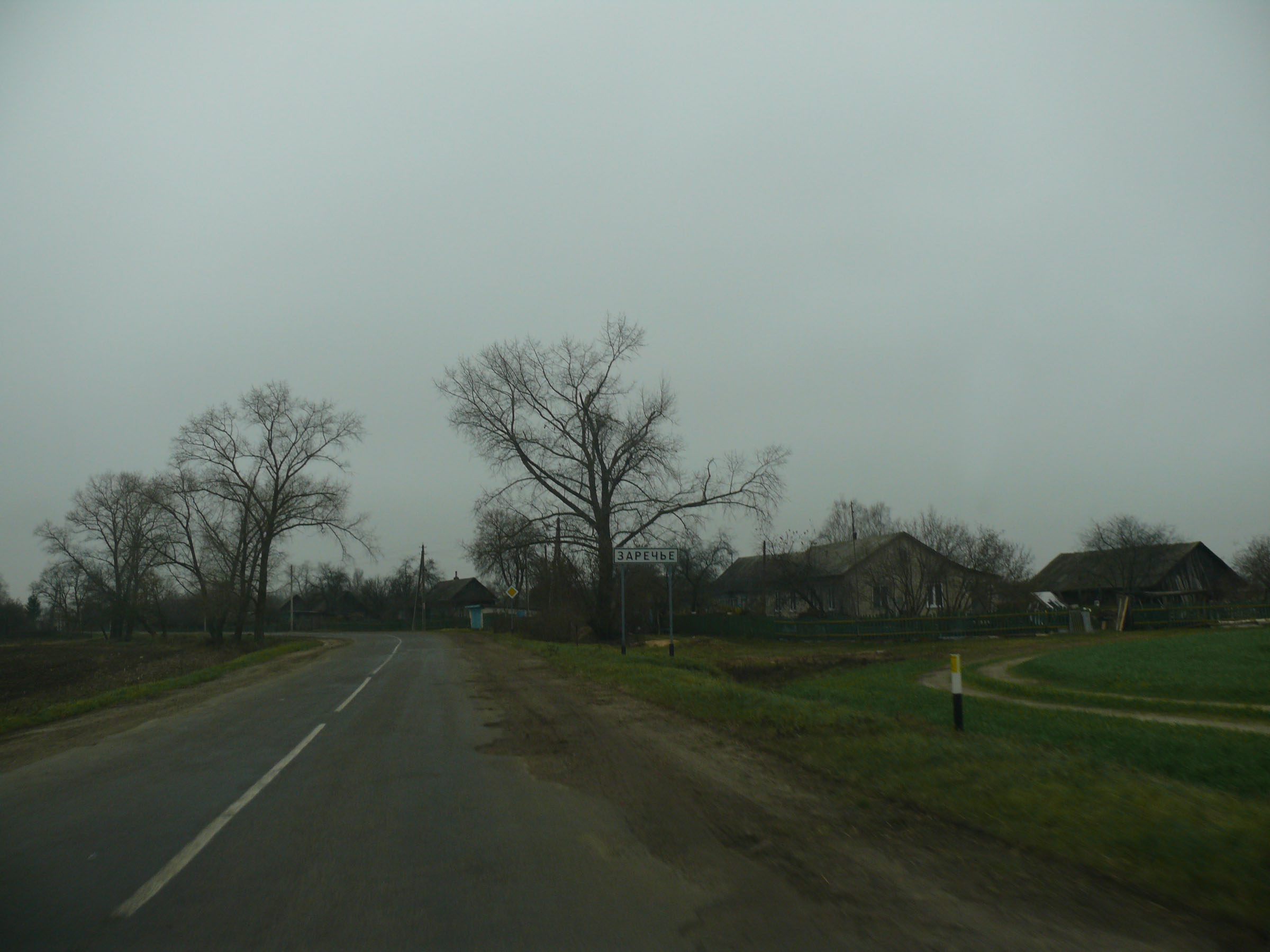 Деревня Заречье Брагинского района Гомельской области Белорусии